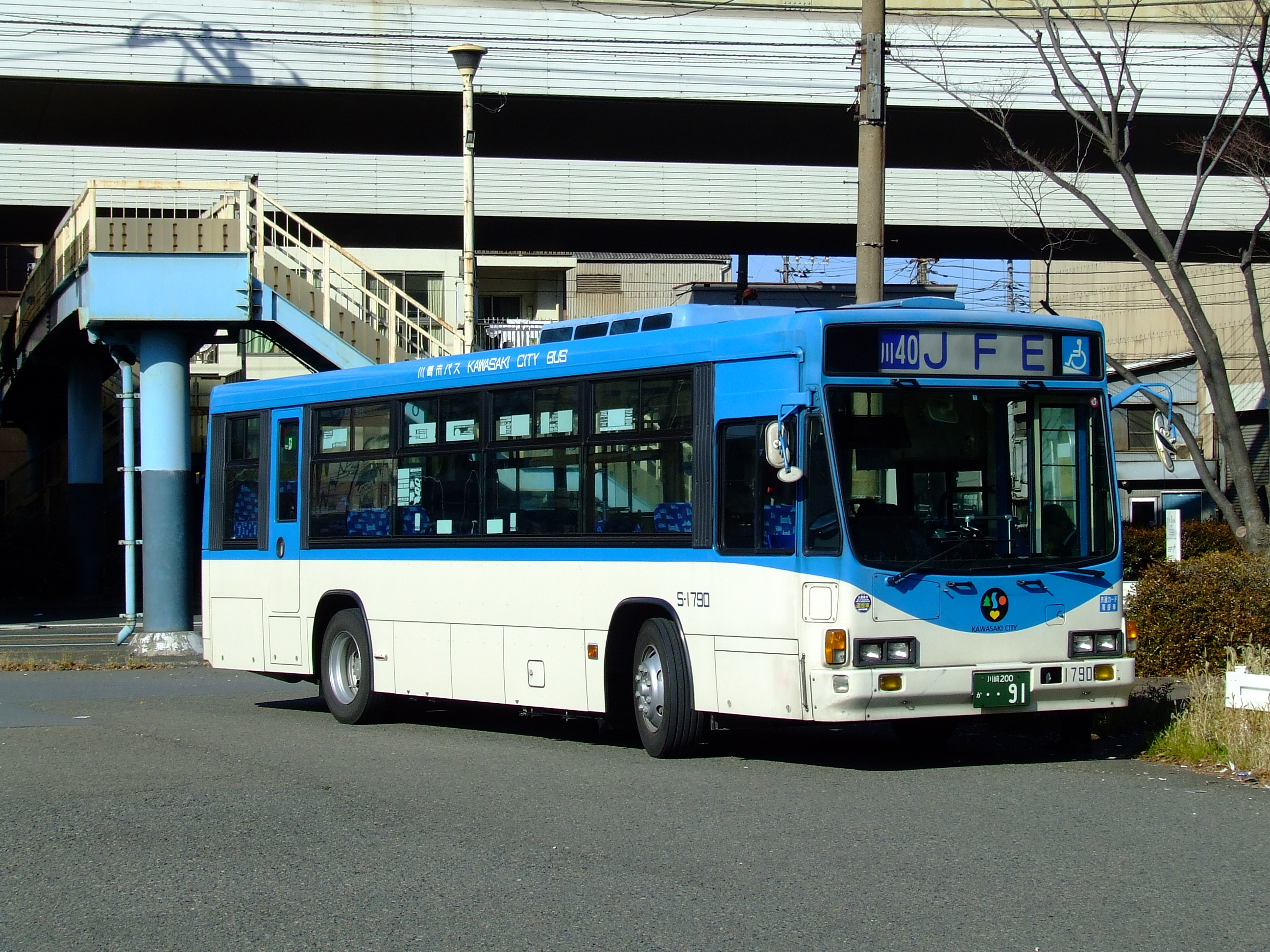 川崎市バスS1790号車 川40系統 JFE停留所にて